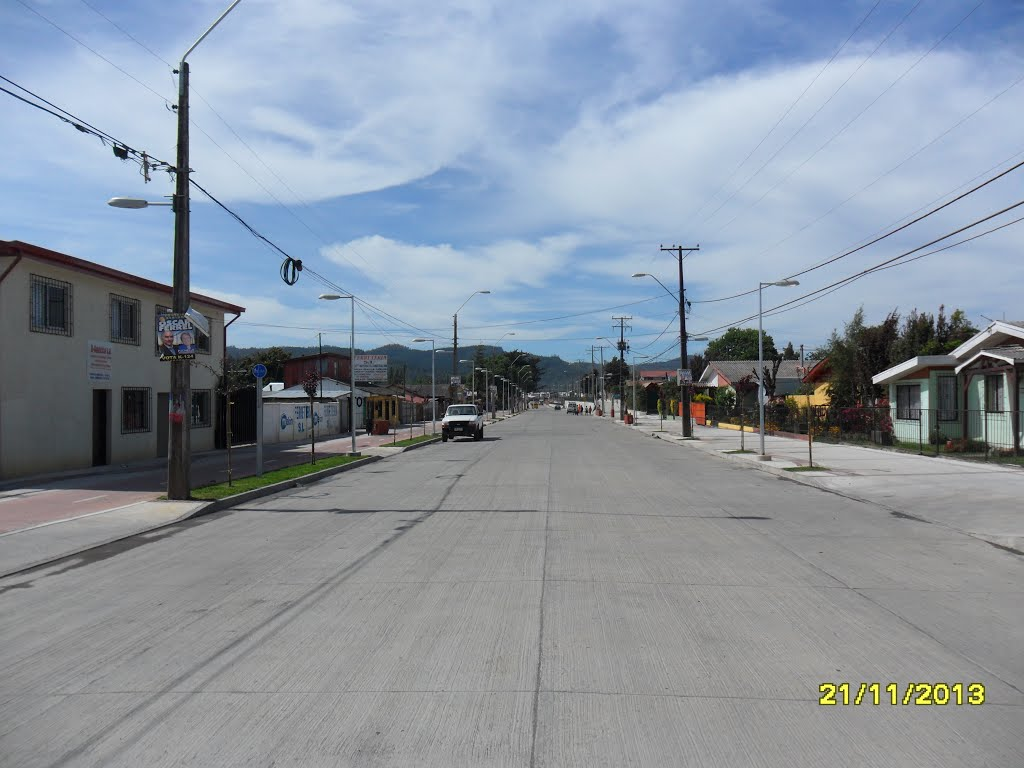 Hualqui es una comuna de la Octava Region